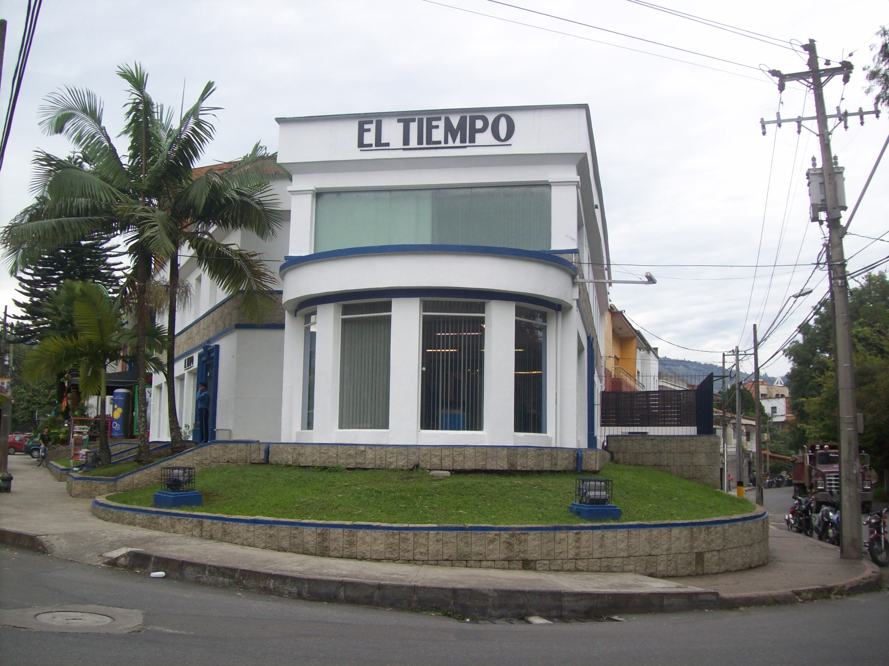 Oficina de El Tiempo en Medellín.